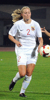 a_14_5458